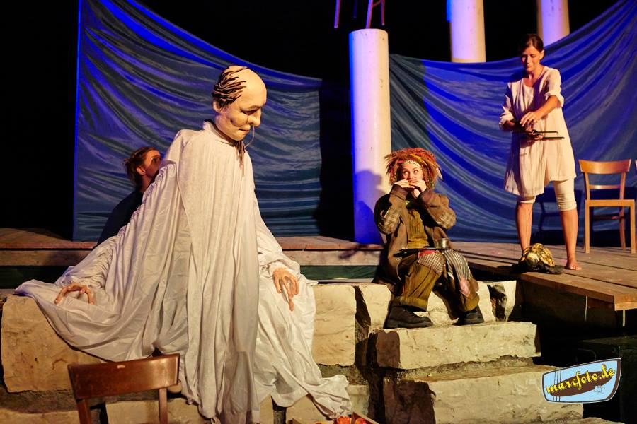 Michael Endes MOMO im Amphitheater (2013): Meister Hora (geführt von Florentine Schara & Korinna Krauss) erzählt Momo (Janina Stopper) und Kassiopeia (geführt von Angela Hundsdorfer) vom Wesen der Zeit.